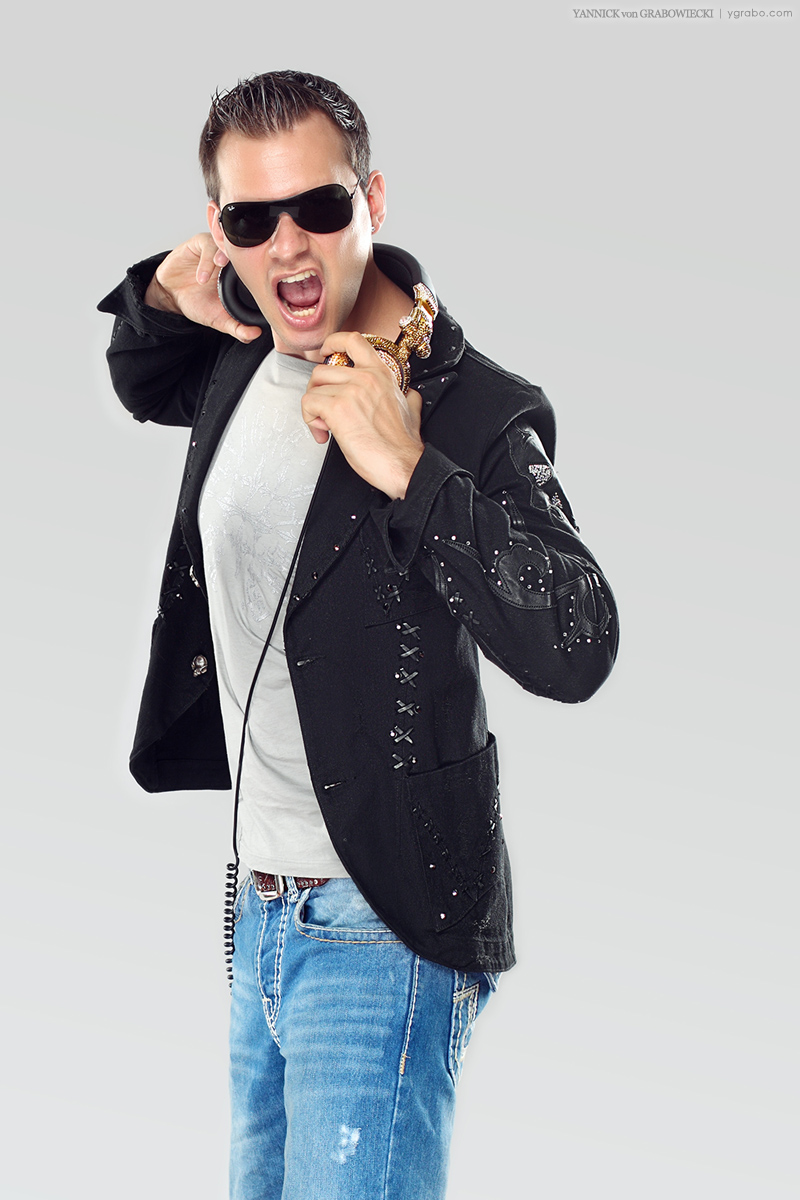 Damon Paul is sehr emotional wenn es um Musik geht! (Studioaufnahme von Yannick von Grabowiecki - - Juli 2012 bei Stuttgart)